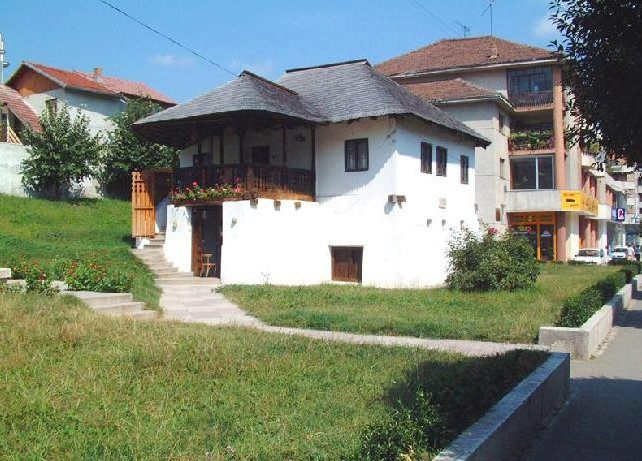 Anton Pann memorial house on Ştirbei Vodă Street in Râmnicu Vâlcea